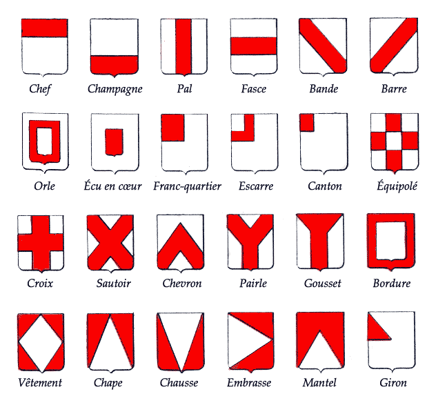 Pièces honorables en héraldique Source Scannée par Nataraja-Shiva dans le Larousse 1923